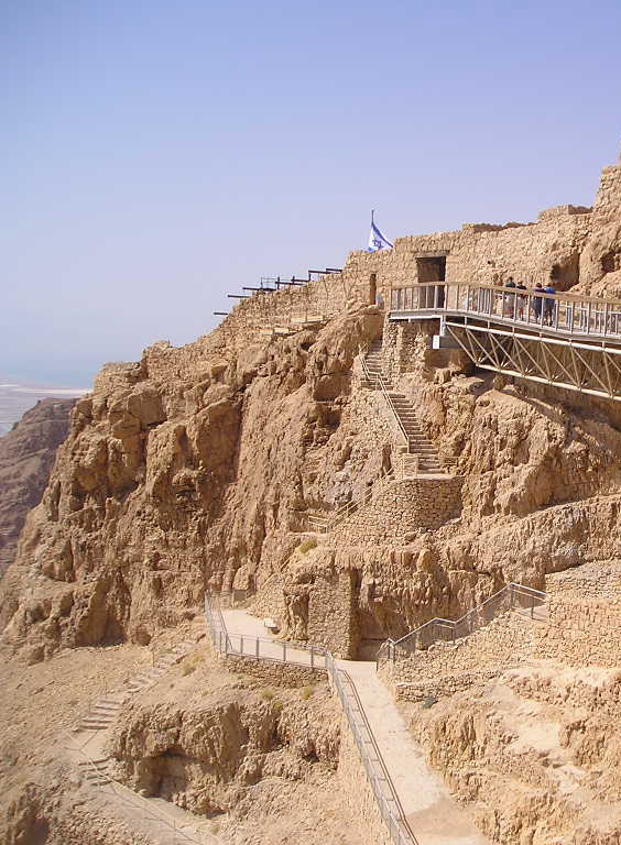 Руины МассадыВ крепости Массада, Израиль